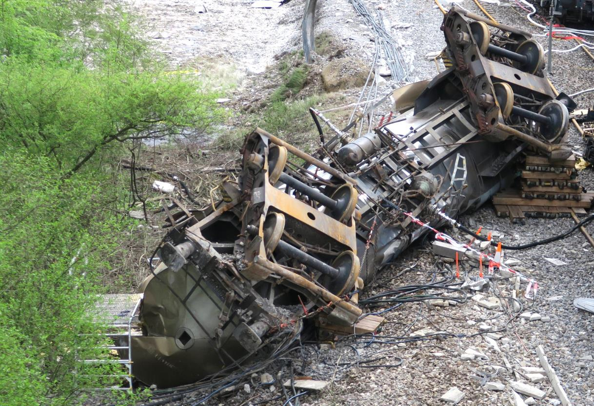 Drittletzter Wagen des Unfallzuges von Daillens. Er wurde bei der Entgleisung 180° um seine Längsachse gedreht.